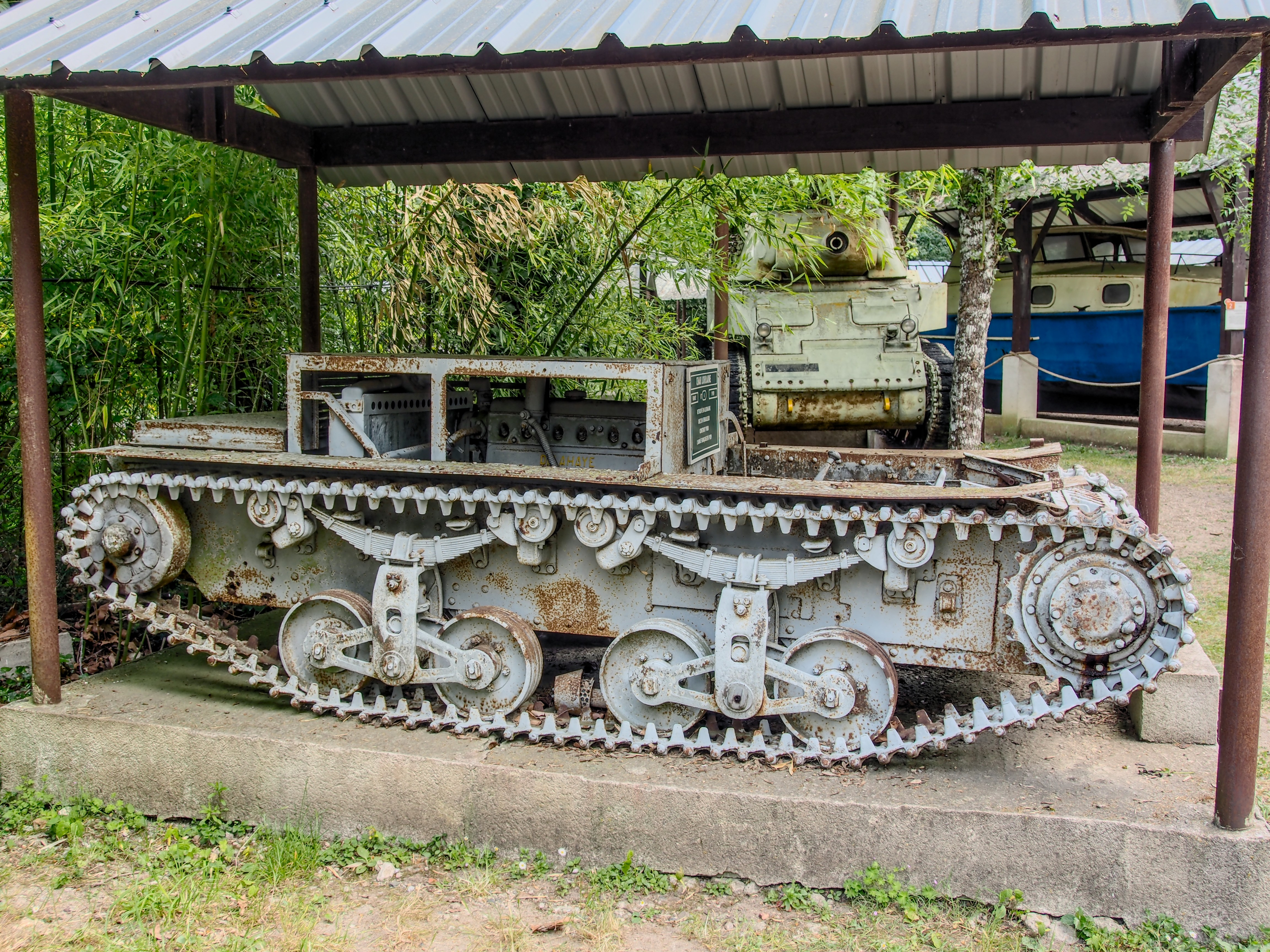 Photographed at Musée Maurice Dufresne, Azay-le-Rideau, France.